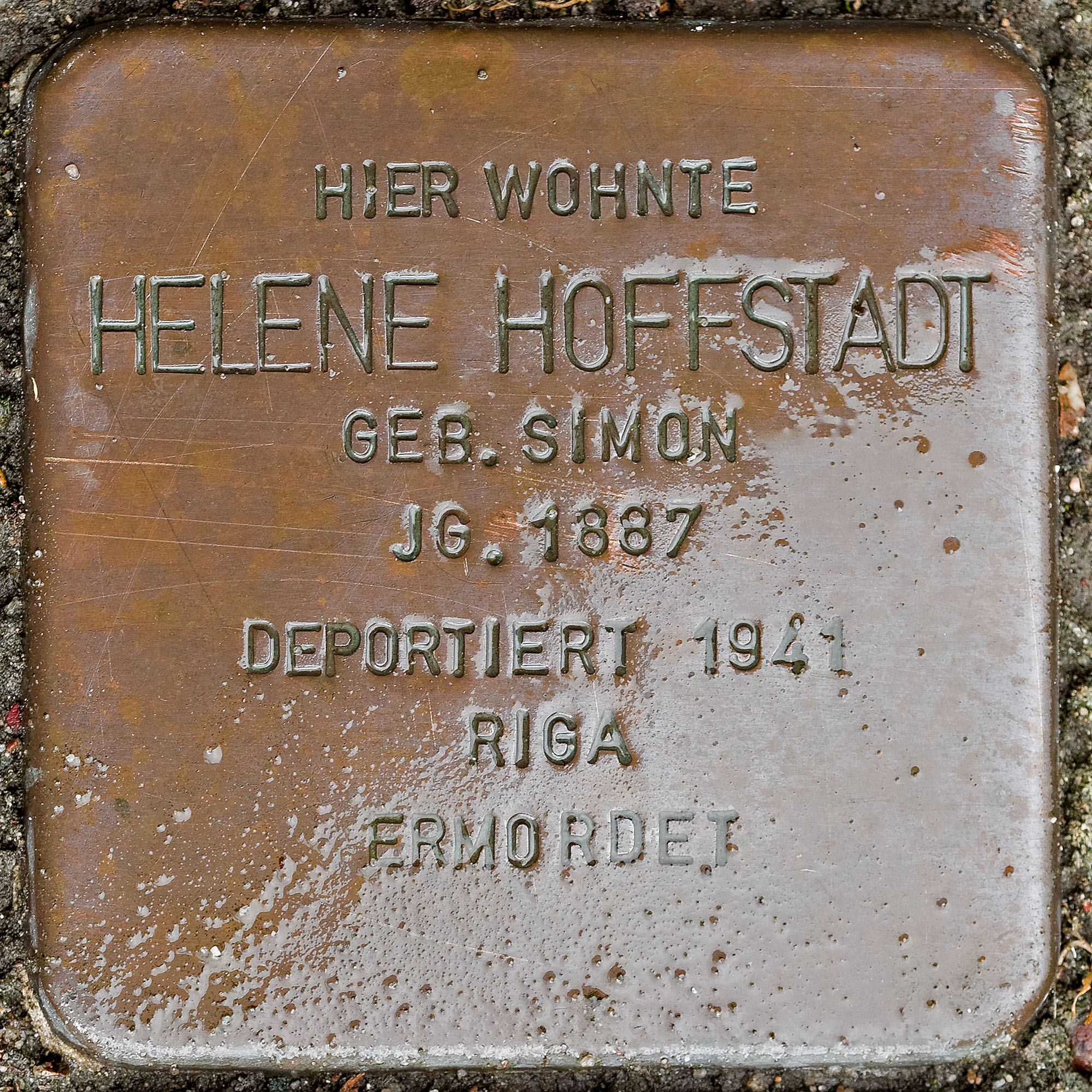 Stolpersteine Straelen: Hoffstadt, Helene